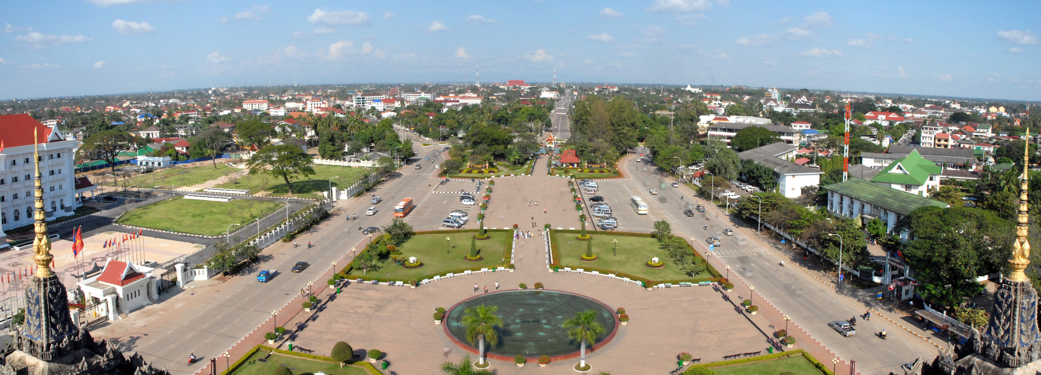 Panorama du nord de la ville de Vientiane dans l'axe de l'avenue Lane Xang (ancienne avenue de France). Le Patouxai (ou Phatouxai) est un monument à la mémoire des victimes de la guerre au Laos, à Vientiane. Il a été construit en 1958. Le nom de Patouxai lui a été donné par le gouvernement après la révolution de 1975. Le Patouxai offre le plus beau point de vue sur la ville de Vientiane.